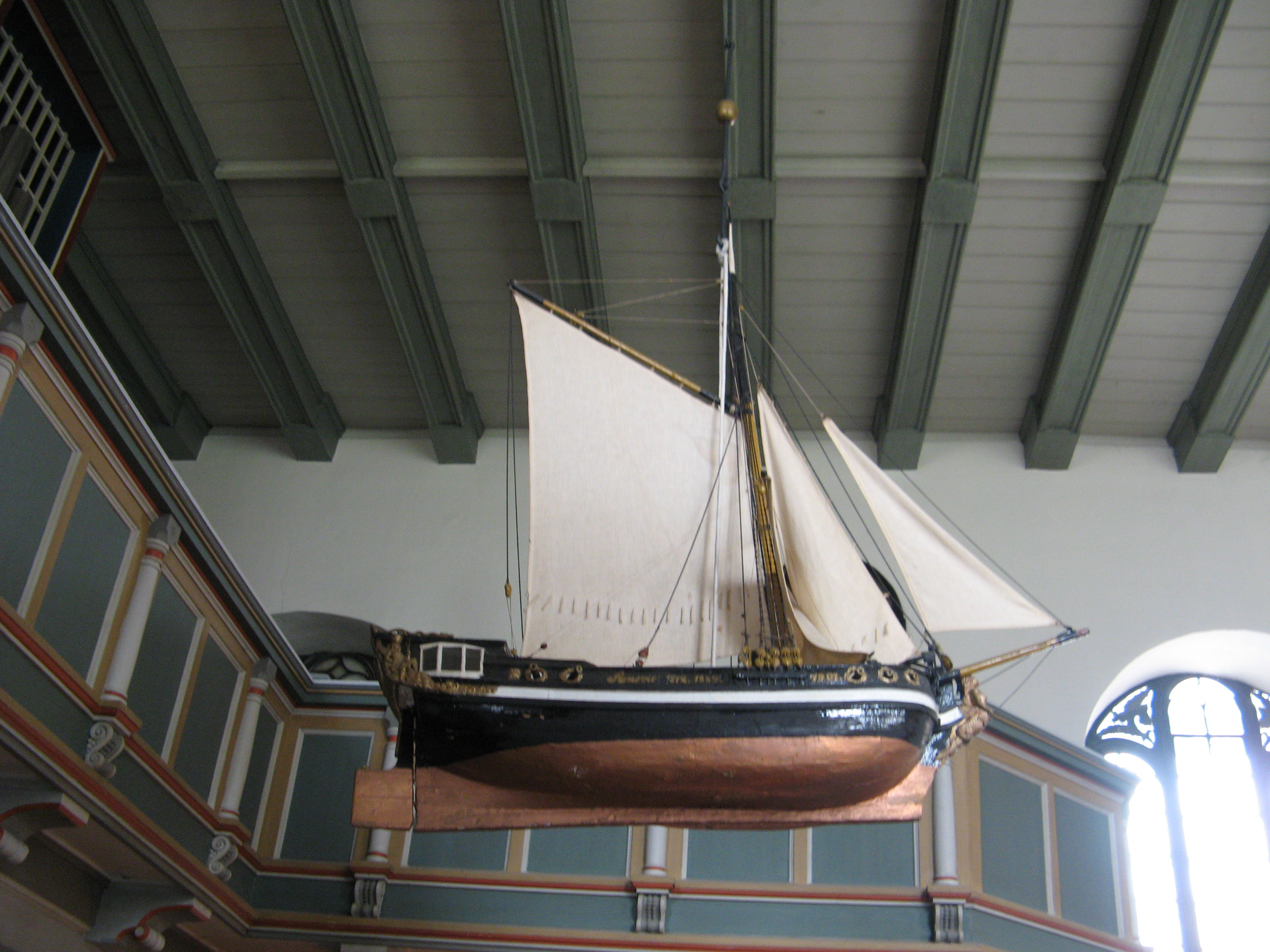 lutheran saint christopherus church in Friedrichstadt Author: Dirk Ingo Franke